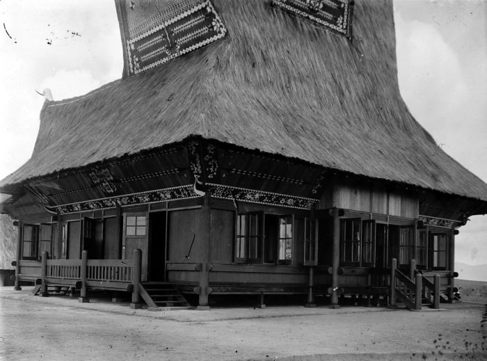 Negatief. De melaatse kolonie, Laoe Si Momo (Bronwater) werd op 25 augustus 1906 op initiatief van assistent-resident Westenberg gesticht. De bedoeling was om de melaatse Batak te isoleren om verdere besmetting te voorkomen. "Getracht zou worden een kolonie te stichten waar alle melaatschen huisvesting en verpleging zouden vinden" (Bodaan n.d. [1921?]:11). De kolonie bevond zich op ongeveer 10 kilometer afstand van Kaban Jahe. Binnen vijf maanden woonden daar 72 leprozen, en in april 1921 was dat aantal gestegen tot 280. De zieken woonden in kleine huisjes. .